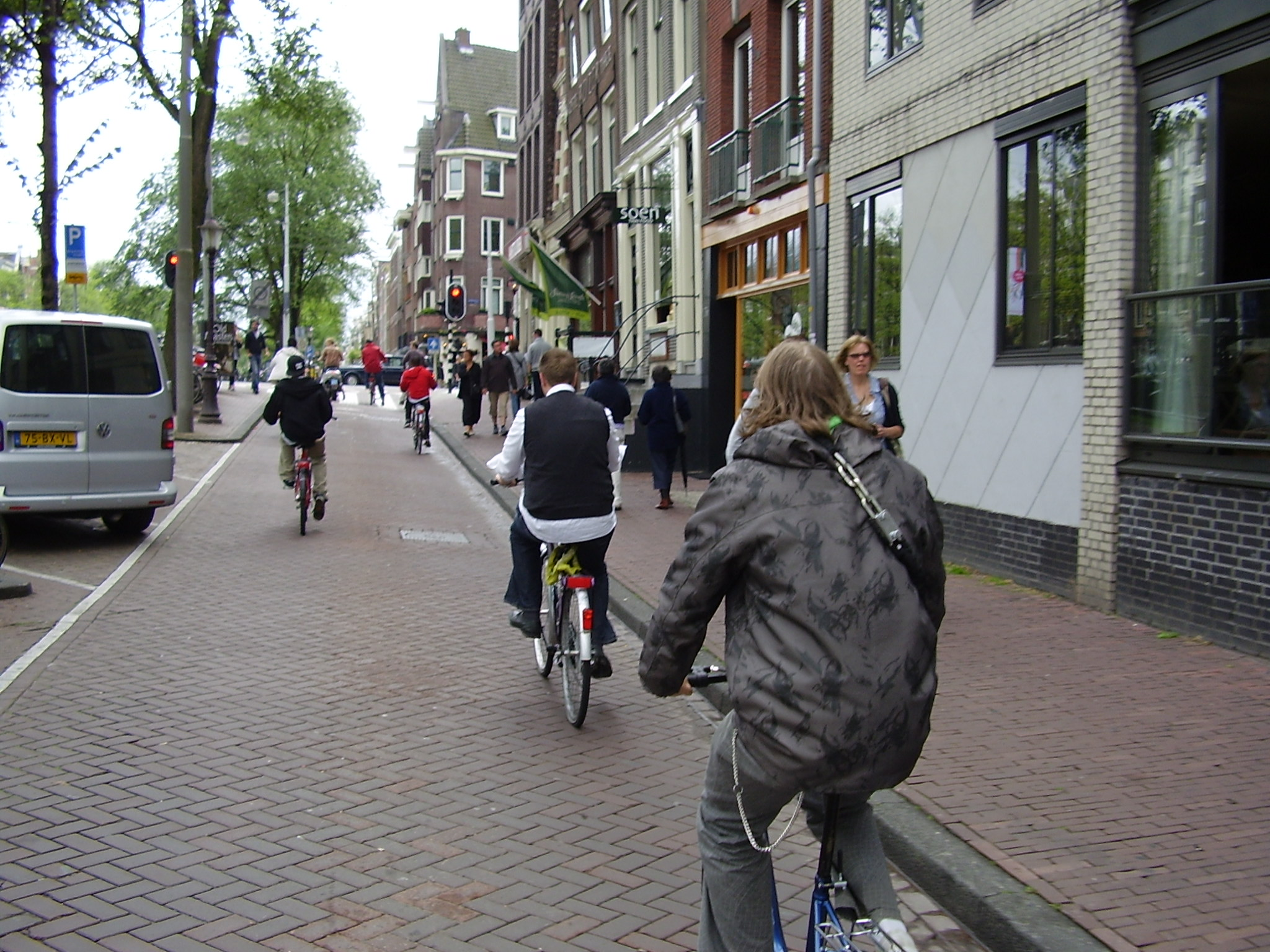 Cycling in Amsterdam